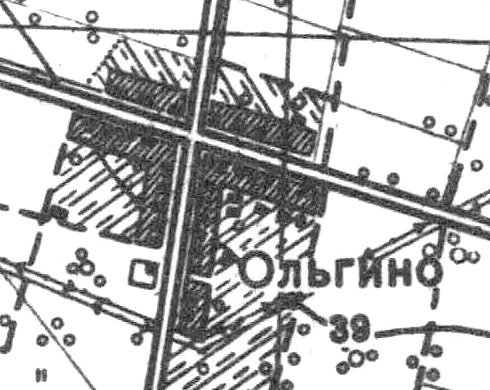 Топографическая карта Ленинградской области, квадрат О-35-12-Б-г (Петергоф), деревня Ольгино